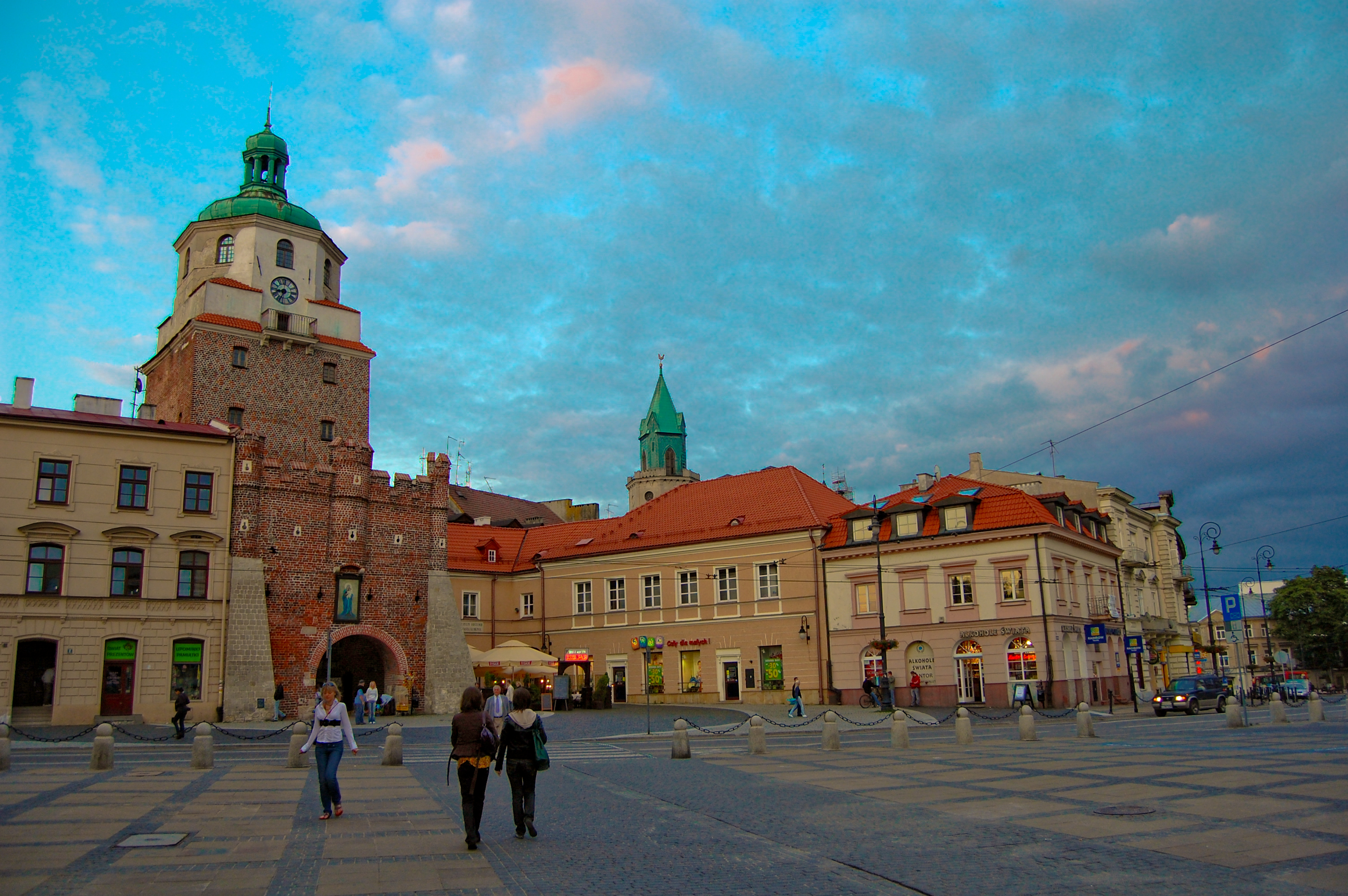 Lublin, Stare Miasto - Brama Krakowska i Plac Łokietka